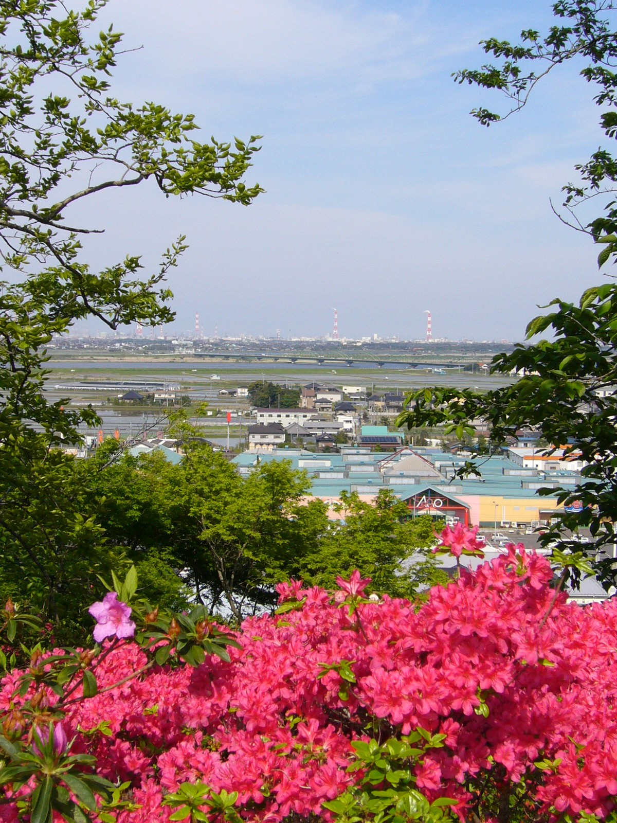 joyama park view,katori-city,japan